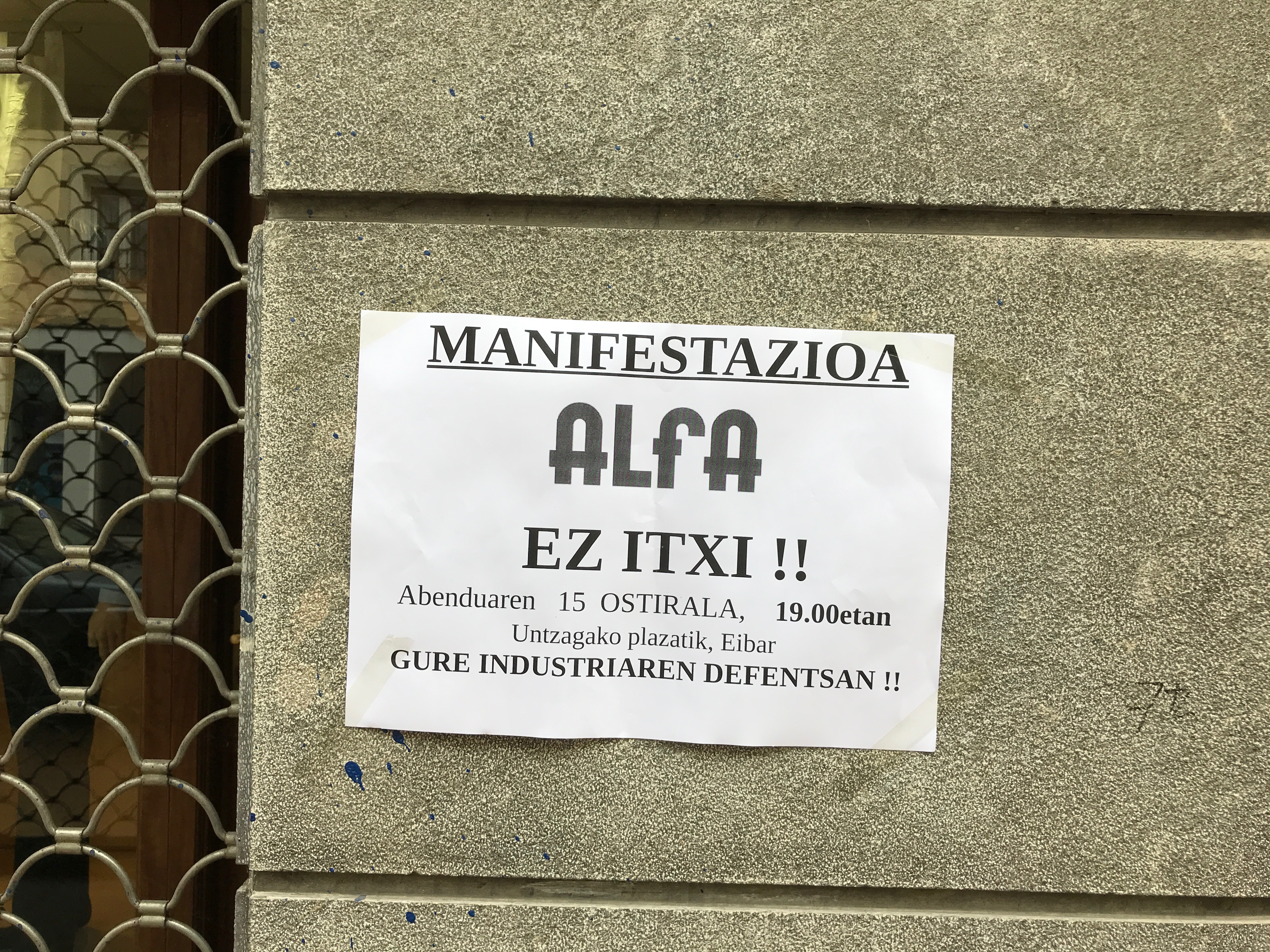 Cartel llamando a la manifestación de protesta por el cierre de Alfa Precision Casting en Eibar el 15 de diciembre de 2017.